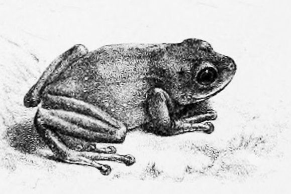 Pseudophilautus chalazodes